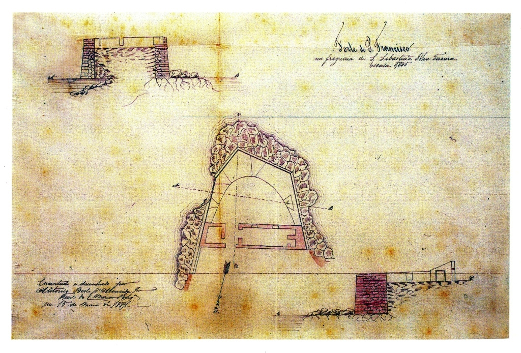 "Forte de S. Francisco na freguezia de S. Sebastião", Ilha Terceira (Açores), Portugal.